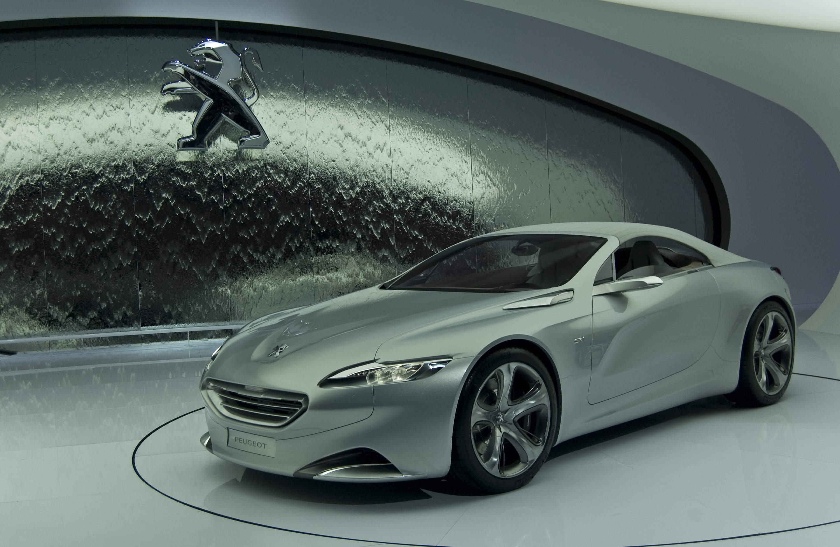 Peugeot SR1 en el Salón de Ginebra 2010.